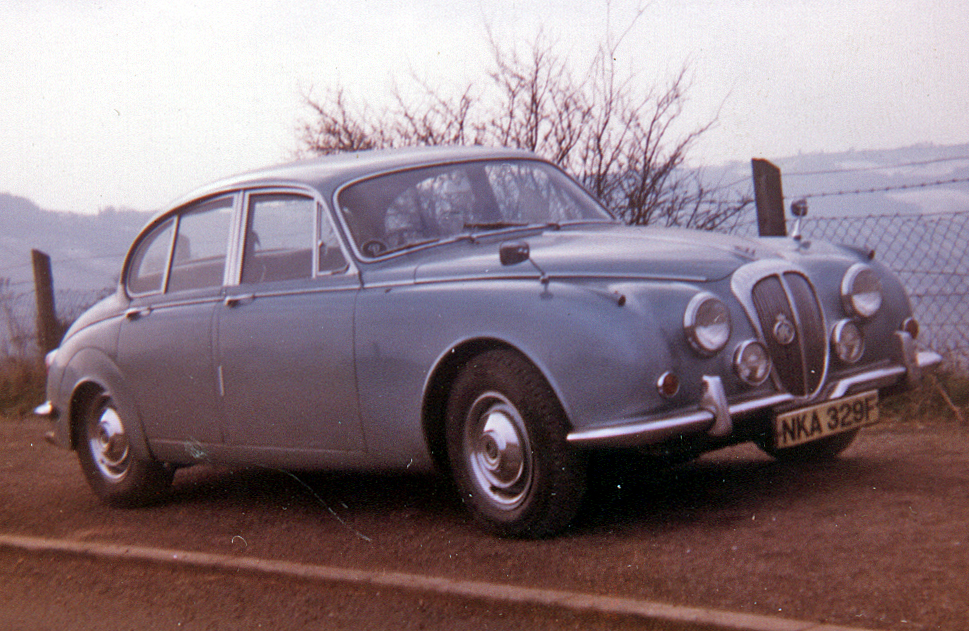 BlueDaimler